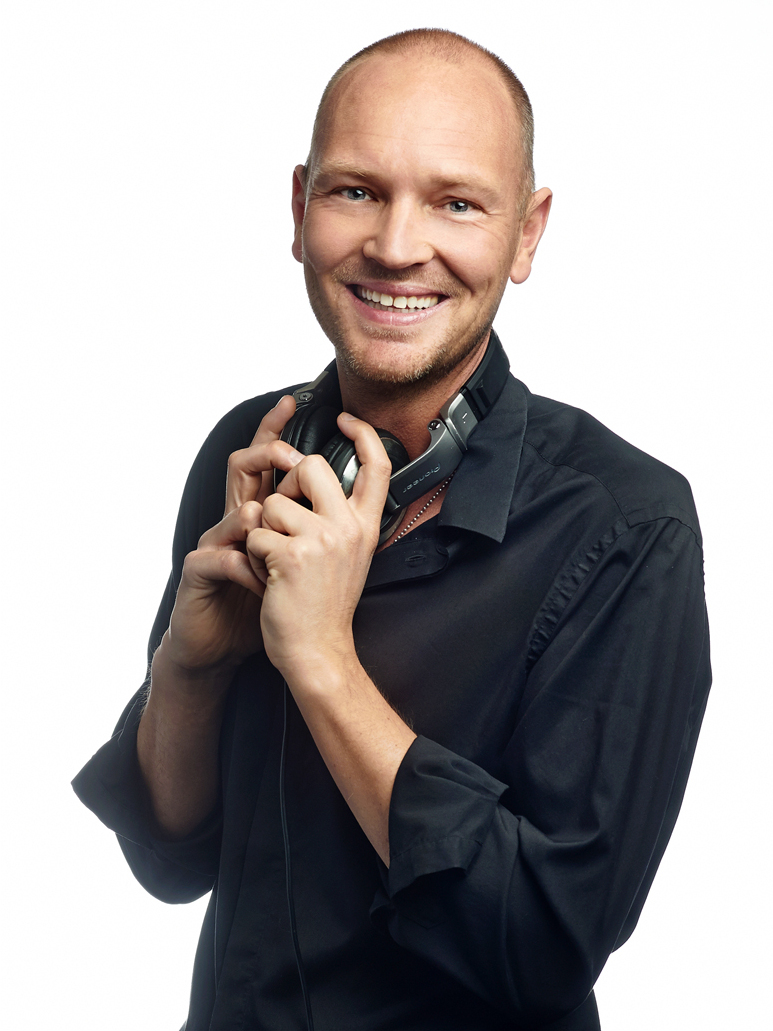 Q-music dj Wouter van der Goes